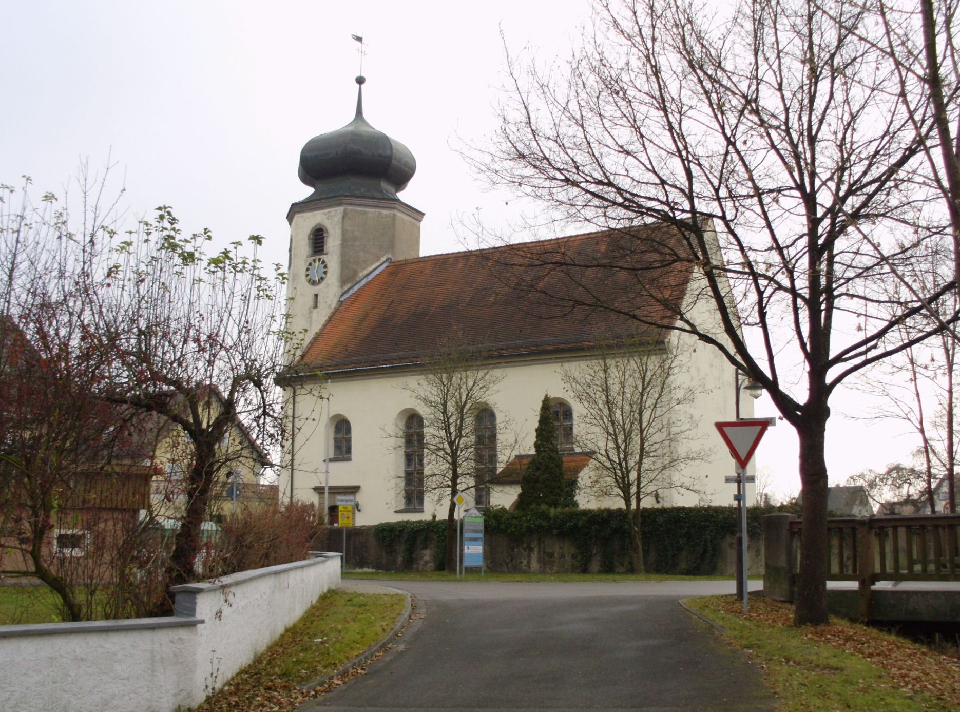 Altenmuhr, Ortsteil von Muhr am See im Landkreis Weißenburg-Gunzenhausen, Evang.-luth. Kirche St. Johannis